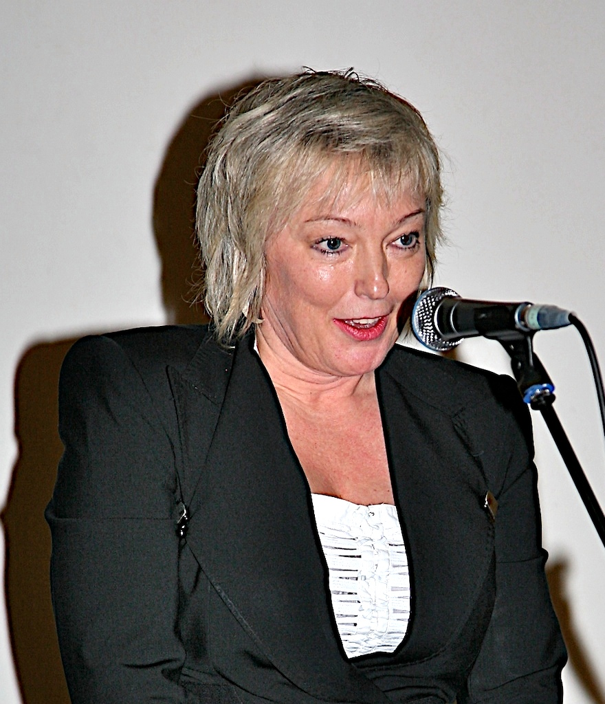 Siri Meyer